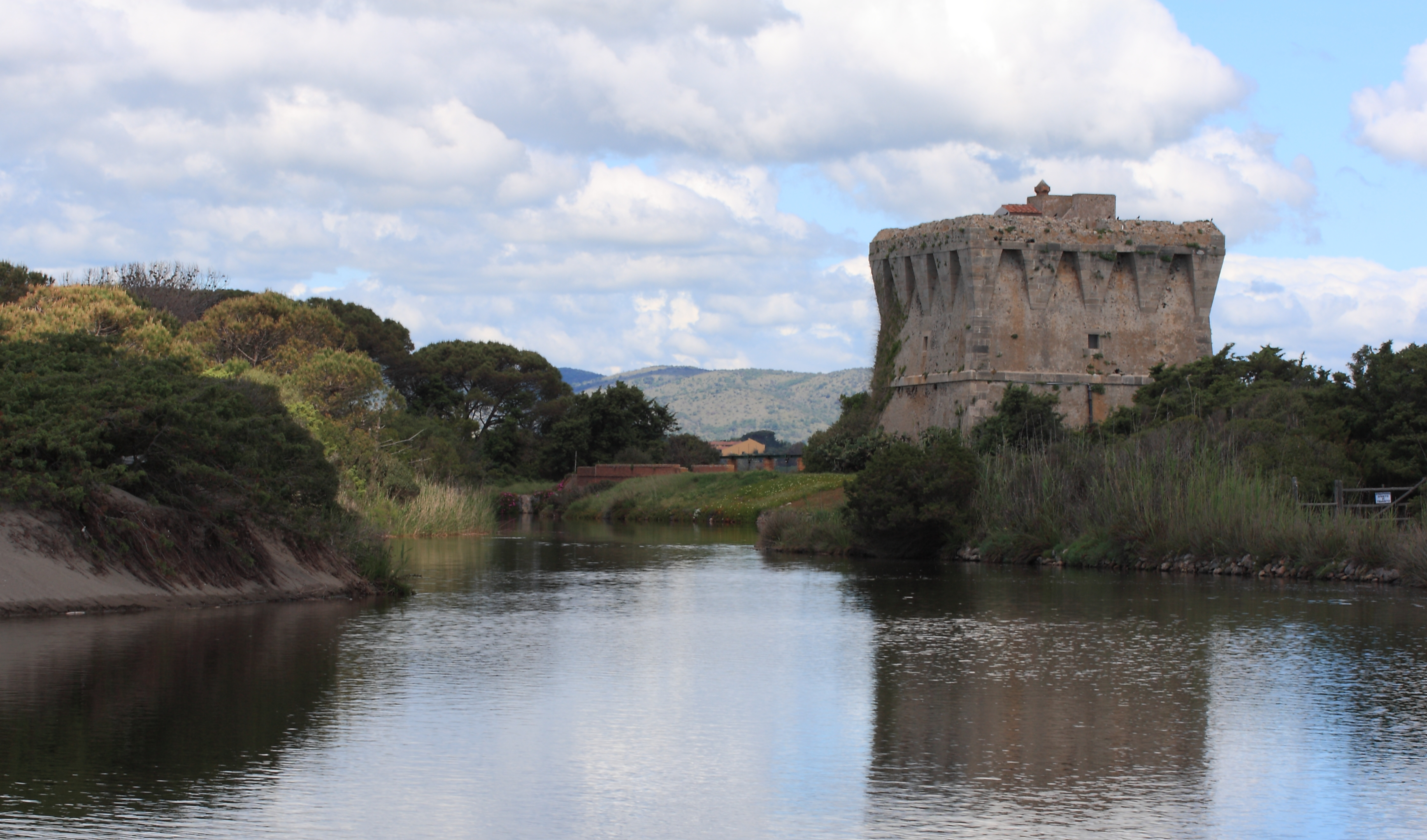 Lago di Burano - Riserva Naturale This is a photo of a monument which is part of cultural heritage of Italy. The authorisation for taking photos of this object was provided by the World Wide Fund for Nature Italy.